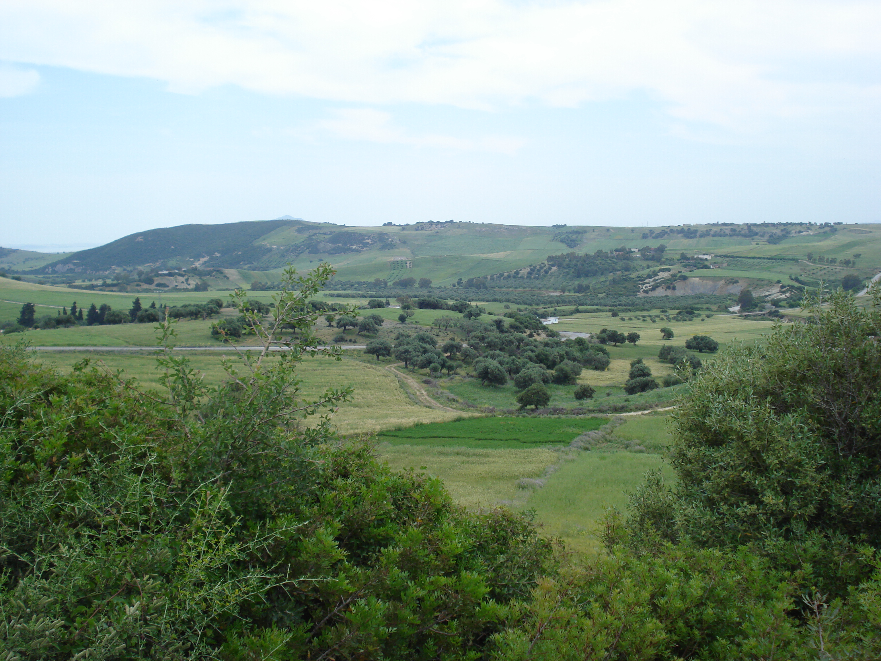 Jebel Aïn Chouna, Délégation de Sejnane, Gouvernerat de Bizerte, Tunisie